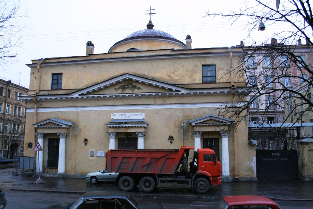 Kośćiół św. Stanisława w Petersburgu